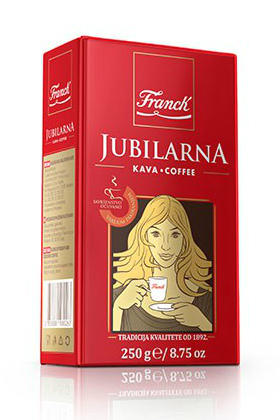 Franckova ikonska Jubilarna kava u vakuumiranom pakiranju, tzv. 'Ciglica'